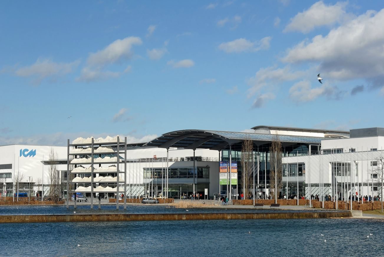 Messe München; Messe - See (West)